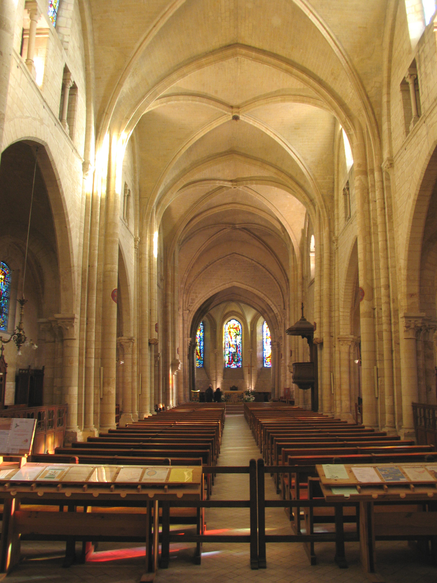 Eglise Saint Pierre de Montmartre à Paris Date : 2006 Lieu : Montmartre, Paris, France Auteur : Pline photo personnelle